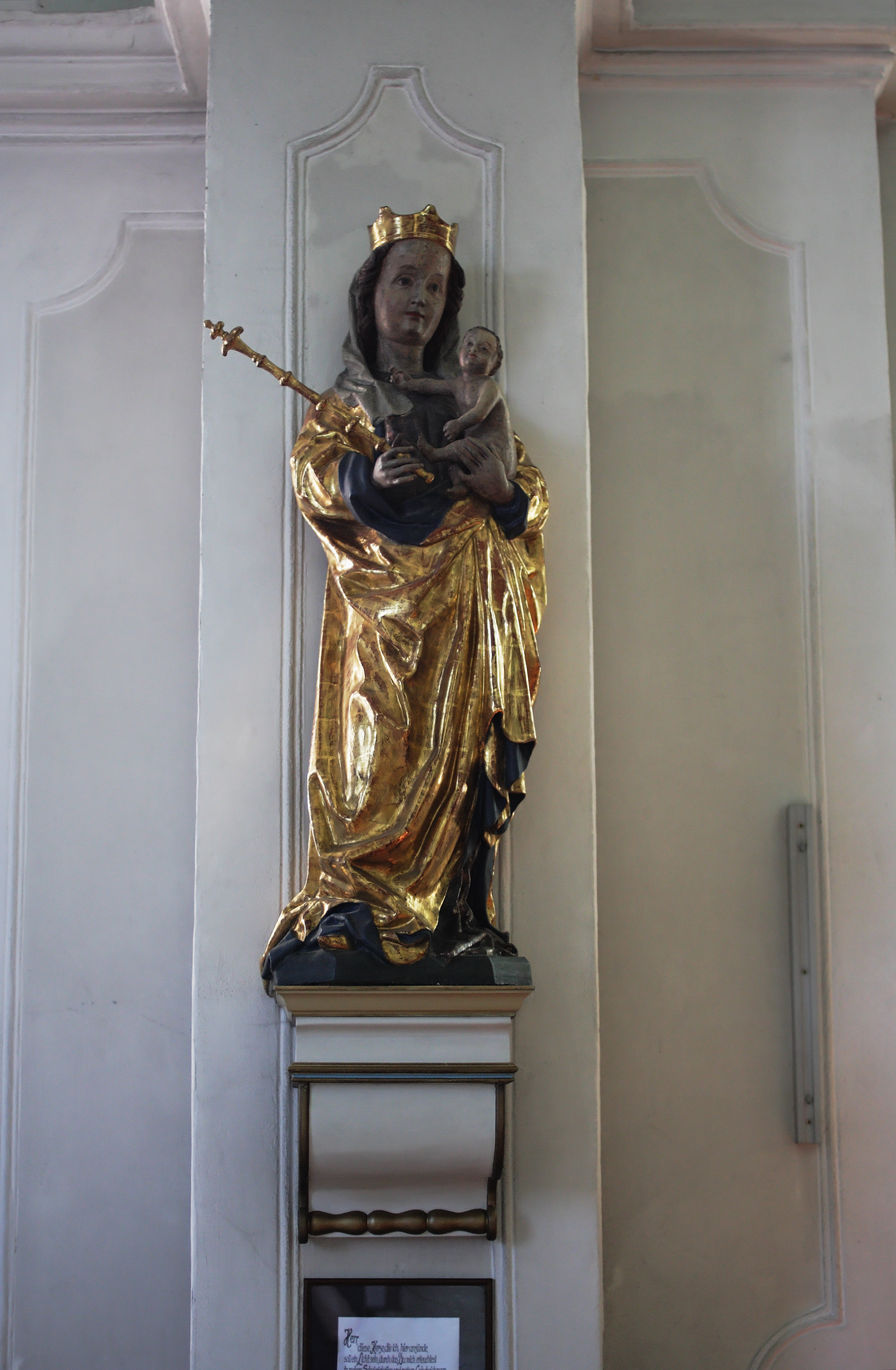 Gotische Muttergottesstatue von um 1500 in der Pfarrkirche St. Stephan in Leonstein (Gemeinde Grünburg)